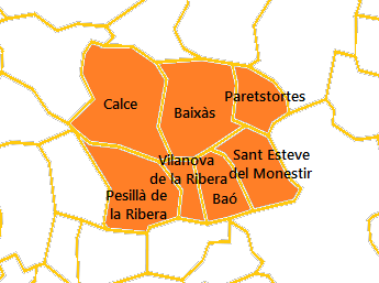 Mapa del Cantó del Ribera elaborat a partir d'un mapa de lliure disposició